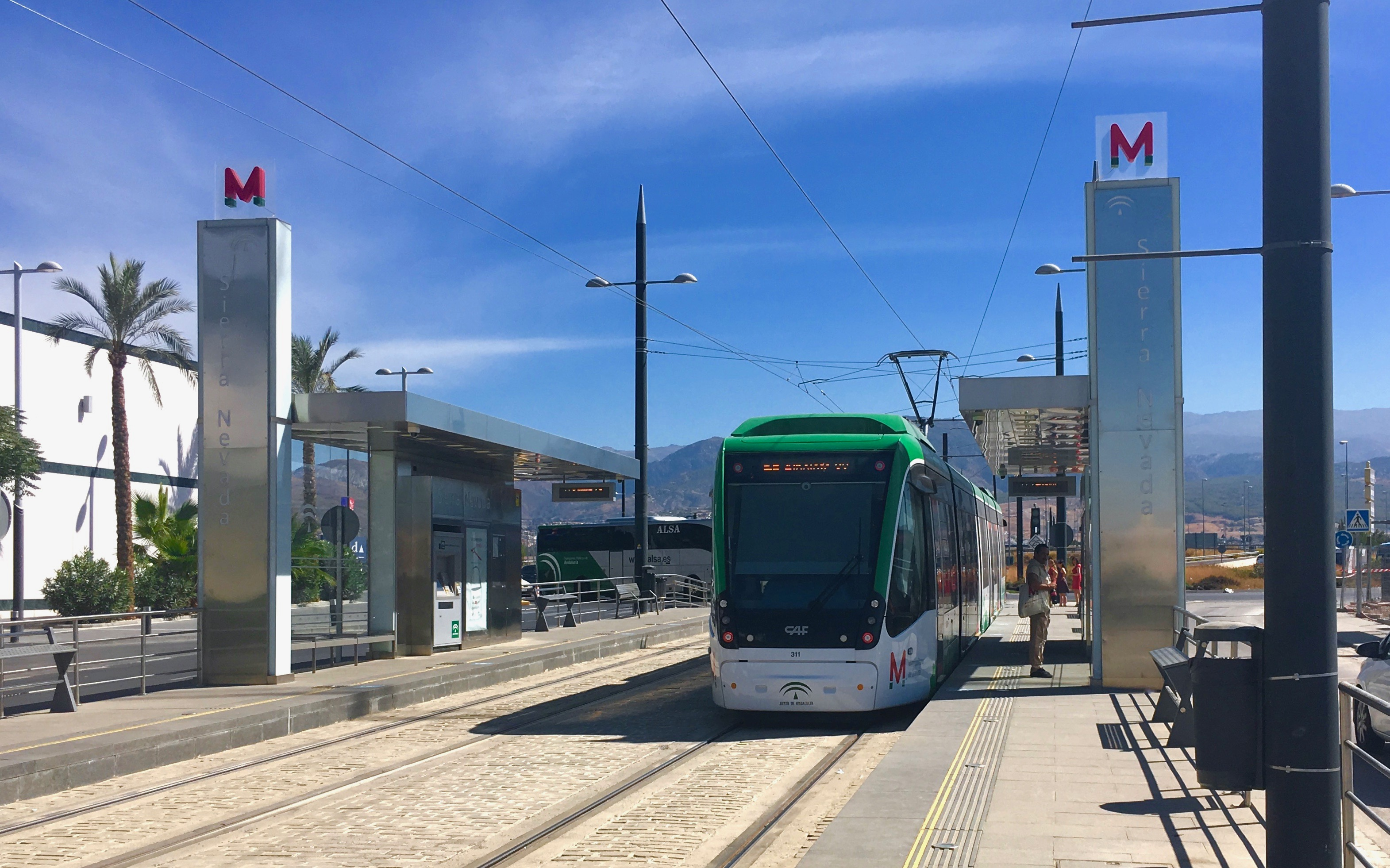 Estación de Sierra Nevada del Metro de Granada